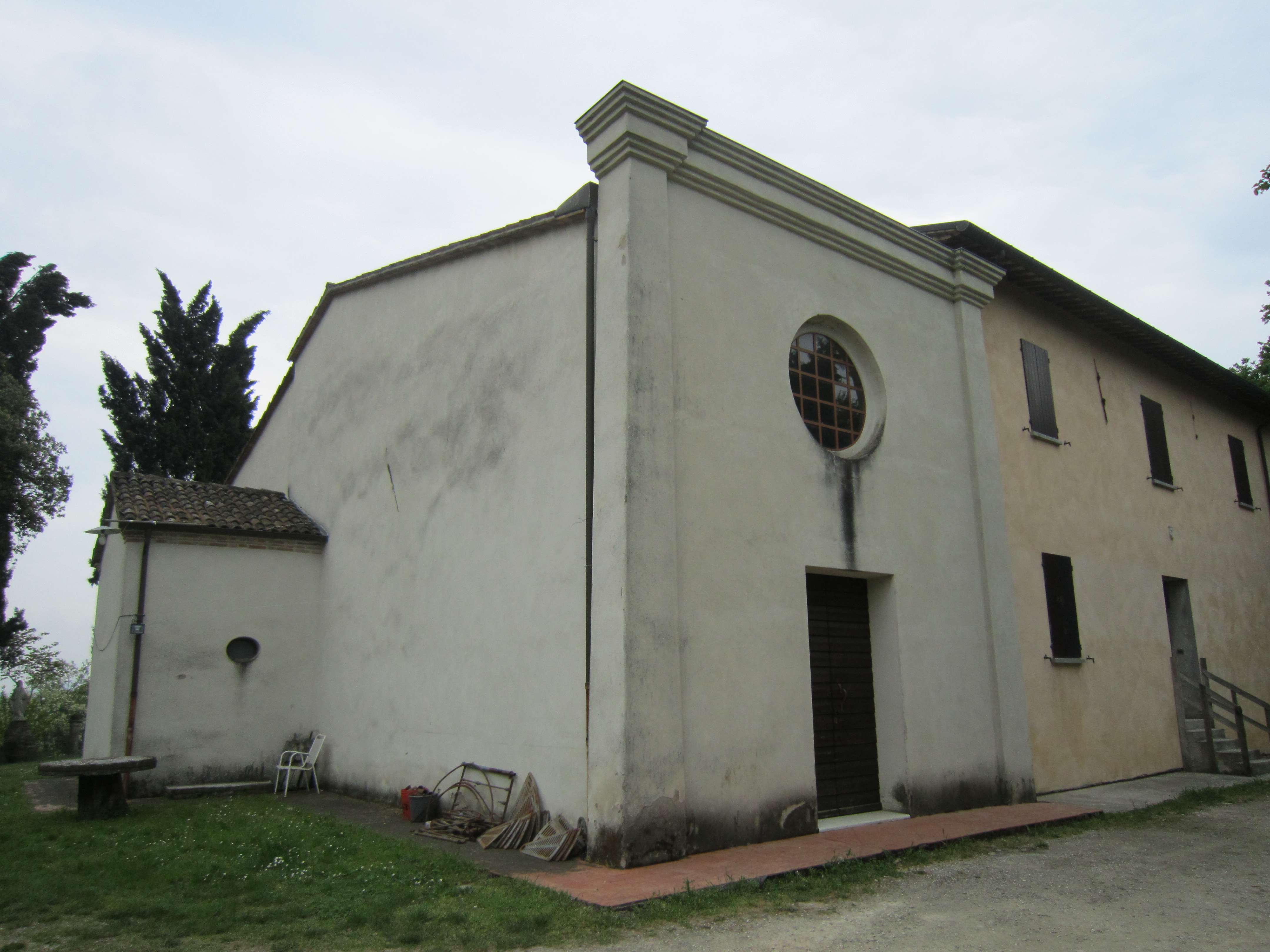 Chiesa di Collina, frazione di Forlì, foto propria